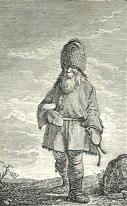 Русский крестьянин в 18 столетии // Брикнер А. Г. История Петра Великого: В 5-ти ч.; Гравюры на дереве Паннемакера и Маттэ в Париже, Кезеберга и Эртеля в Лейпциге... и др. - СПб.: Тип. А.С.Суворина, 1882-1883. - С. 614.